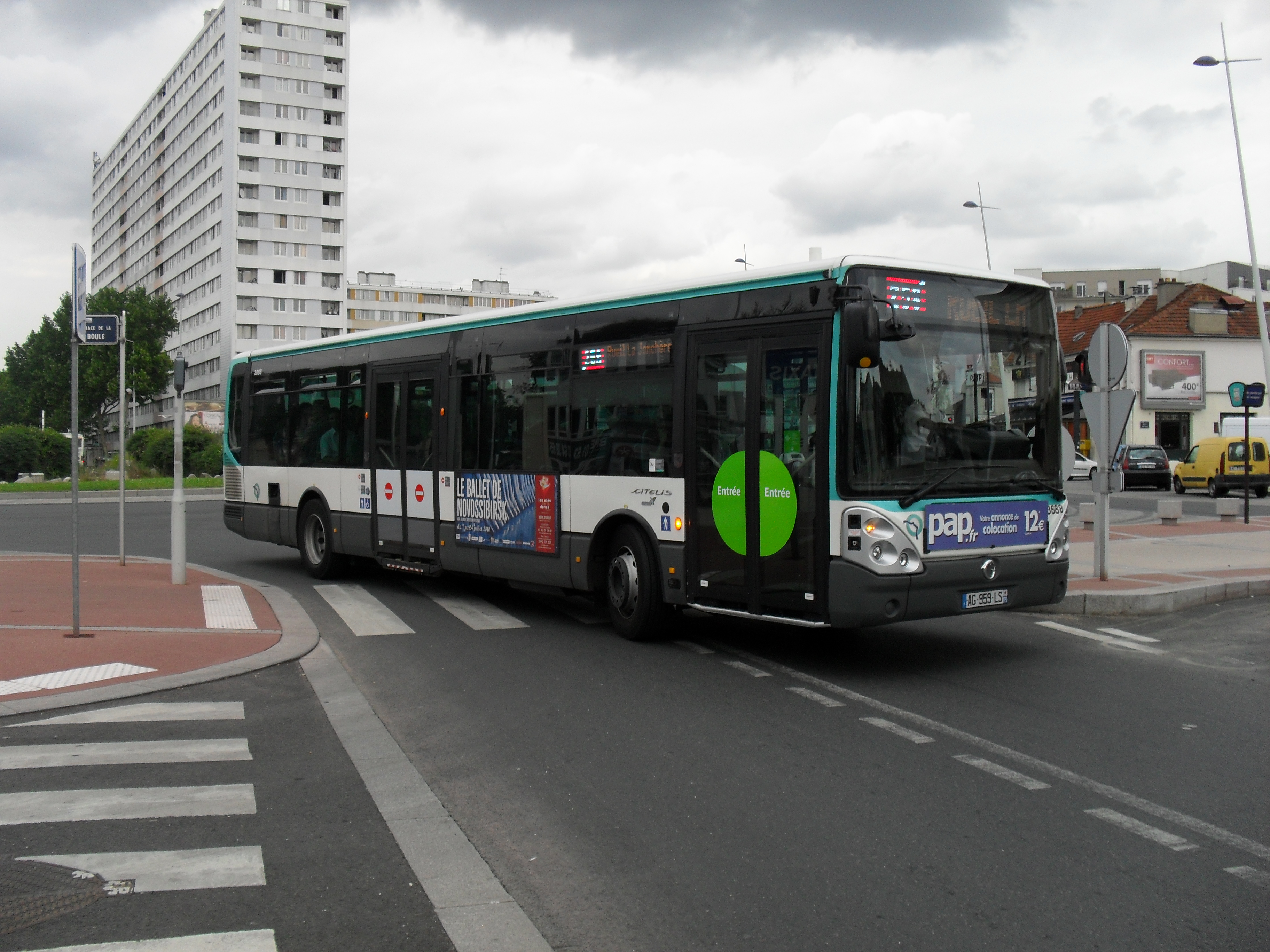 Ligne RATP 258